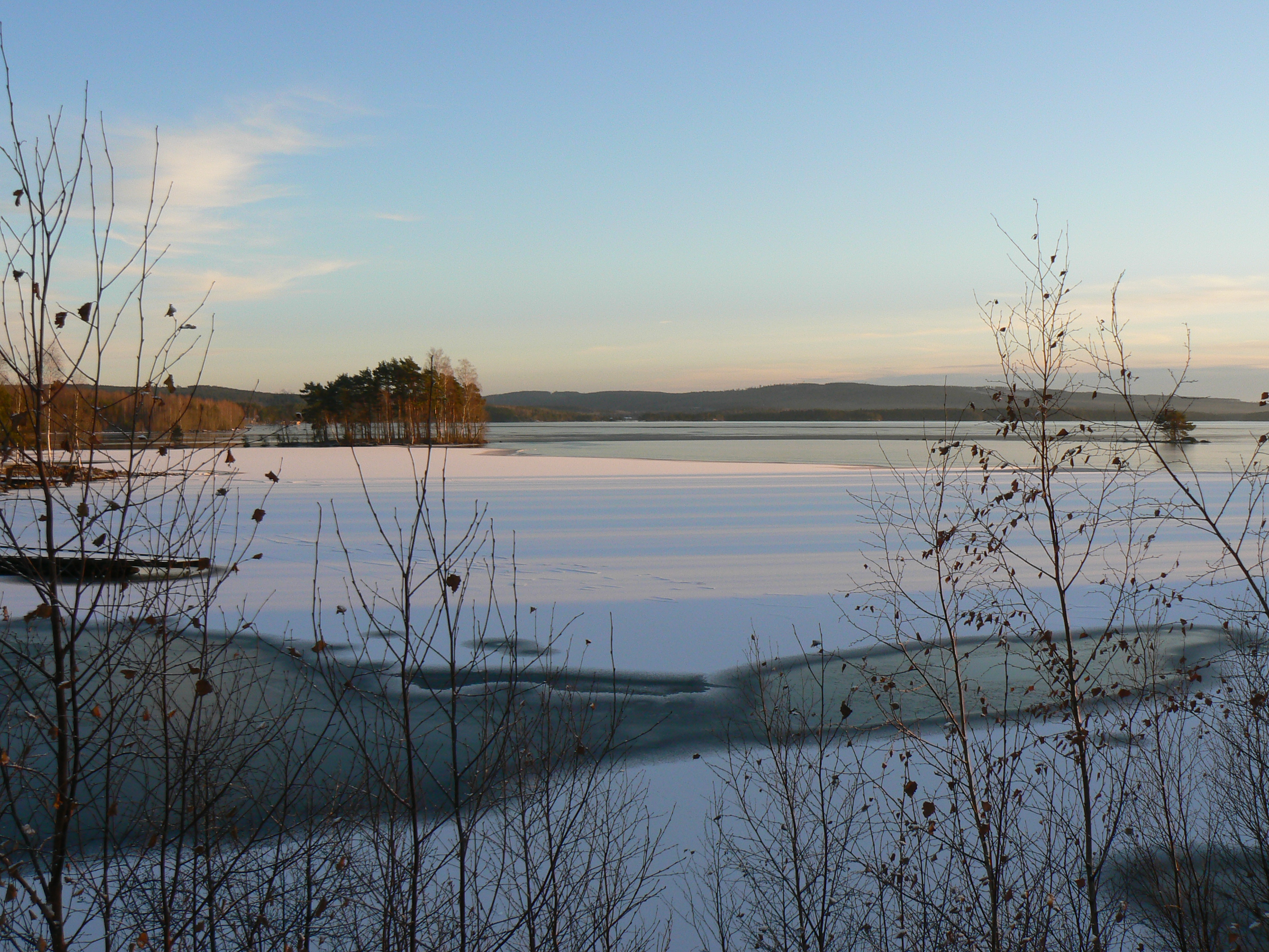 Lake Runn in Dalarna, Sweden. View from Roxnäs in Falun. Photo by Skvattram 2007-01-06.